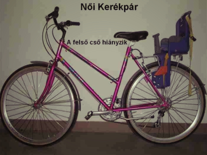 Női kerékpár